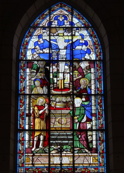 Eglise St Antoine, Verrière axiale, la Fontaine de Vie, XVIe siècle